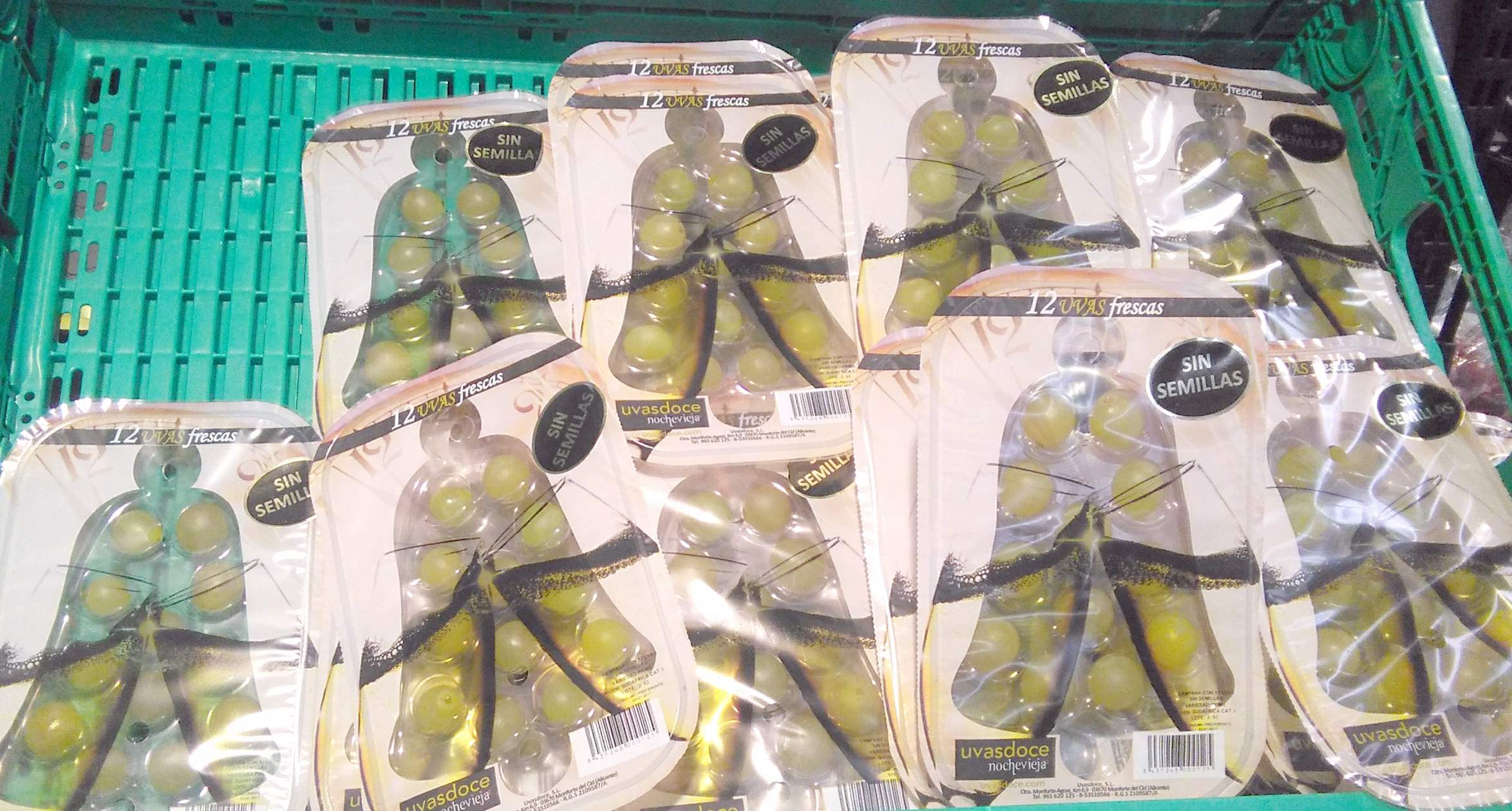 Uvas de Navidad a la venta en un supermercado de Vitoria en la tarde del 31 de diciembre de 2016